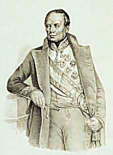 "Ritratto di Radetzky", ridotto e ritoccato, litografia